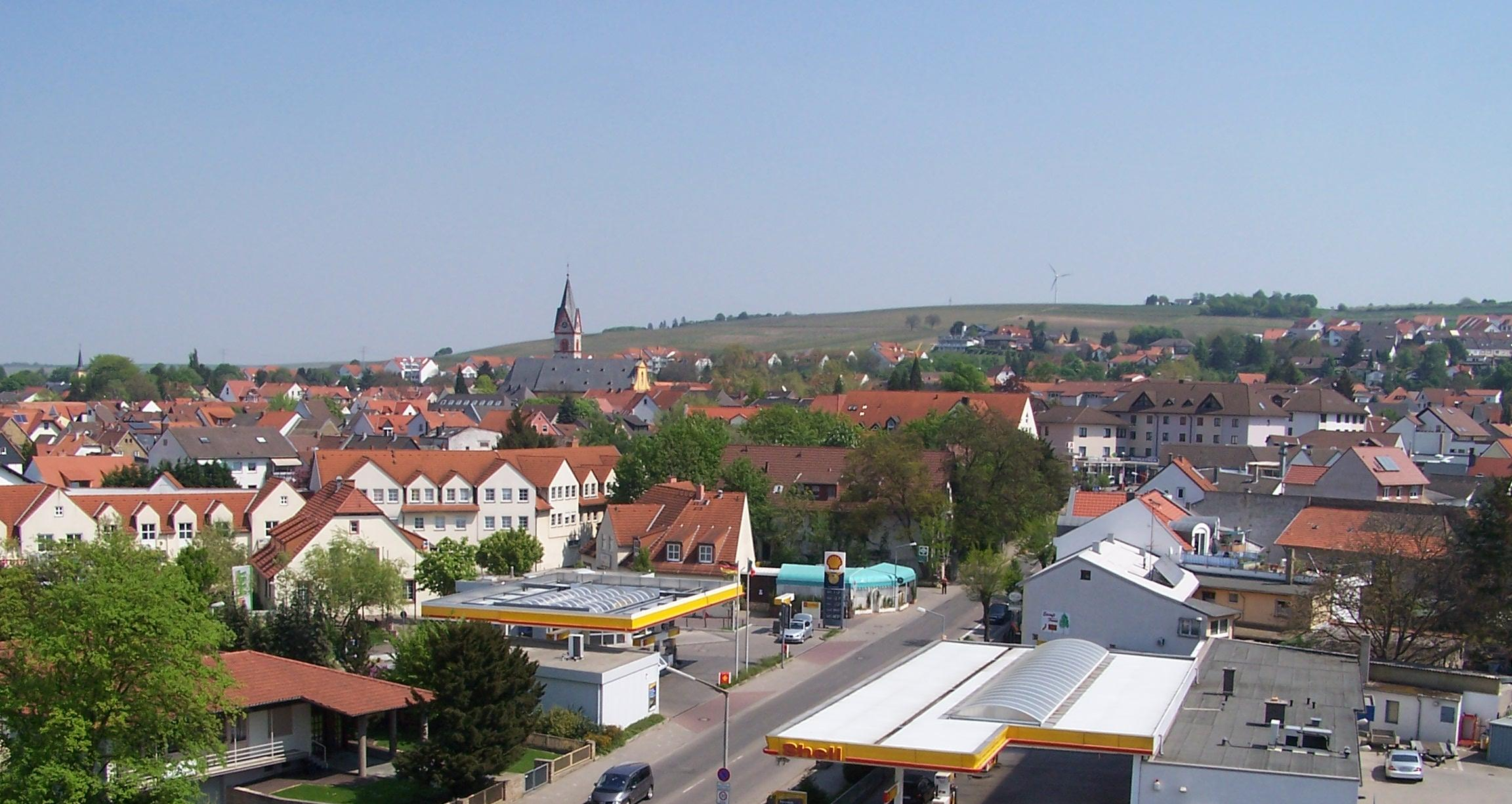 Westansicht von Nieder-Olm